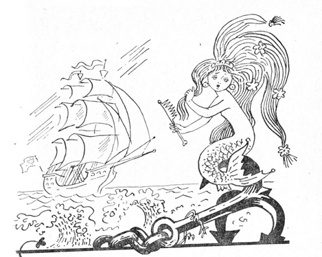 Иллюстрация к сказке Андерсена "Русалочка". Художник Д. А. Брюханов